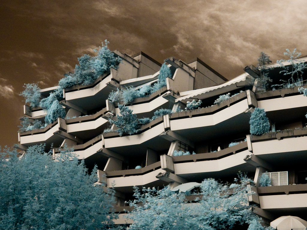 Panelház infravörösben (720nm), helyszín: Unterhaching, Németország